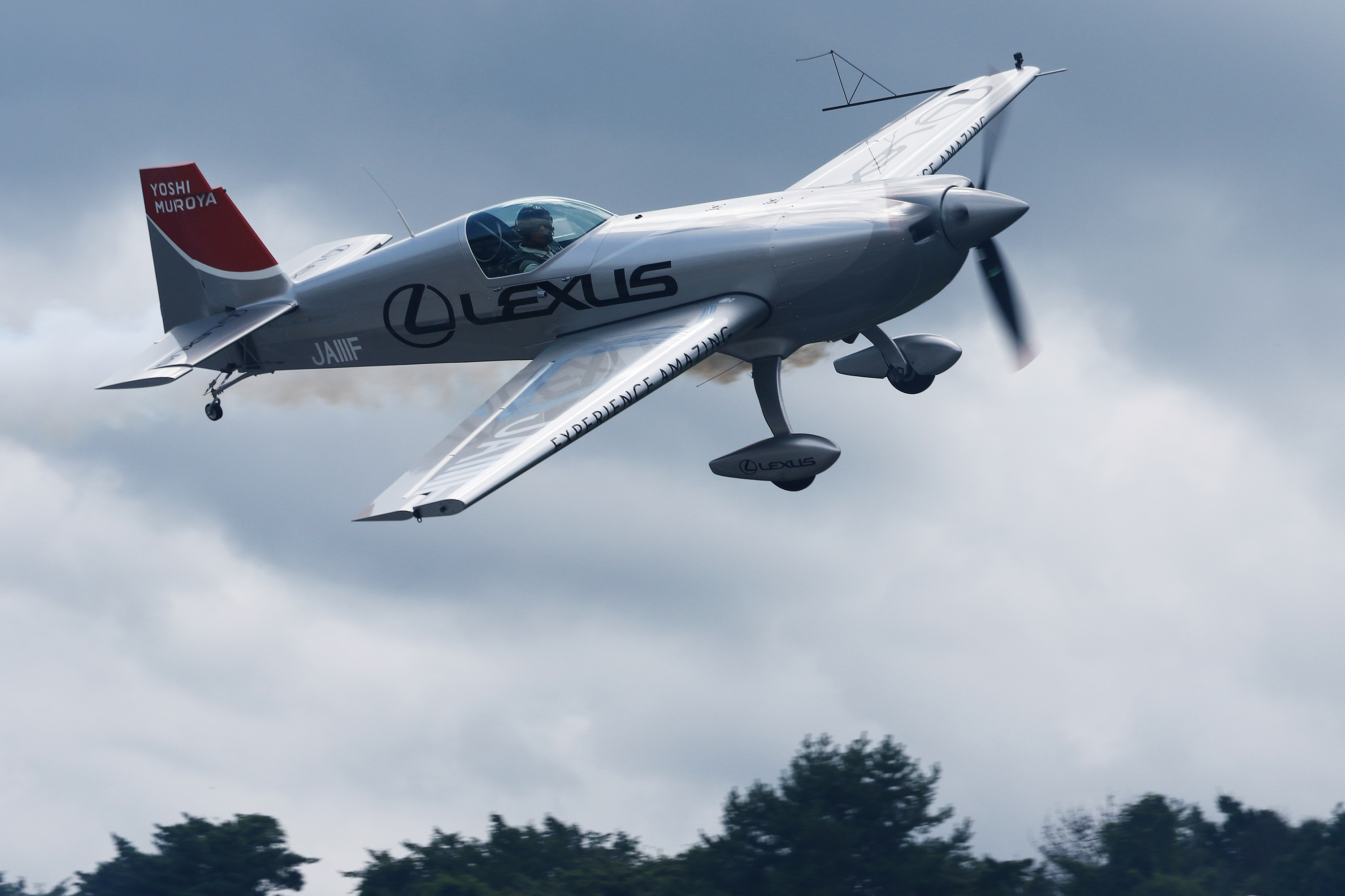 2017.8.5 SUPER GT Rd.5 Fuji Speedway フライト・パフォーマンス 室屋義秀 [7D2_4736ks]